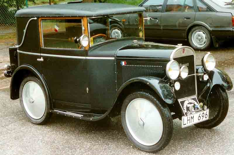 Rosengart LR2 4HP Faux Cabriolet 1928 (OBS! Den som lagt in bilden har skrivit fel bilmodel. Jag vet eftersom jag äger den).